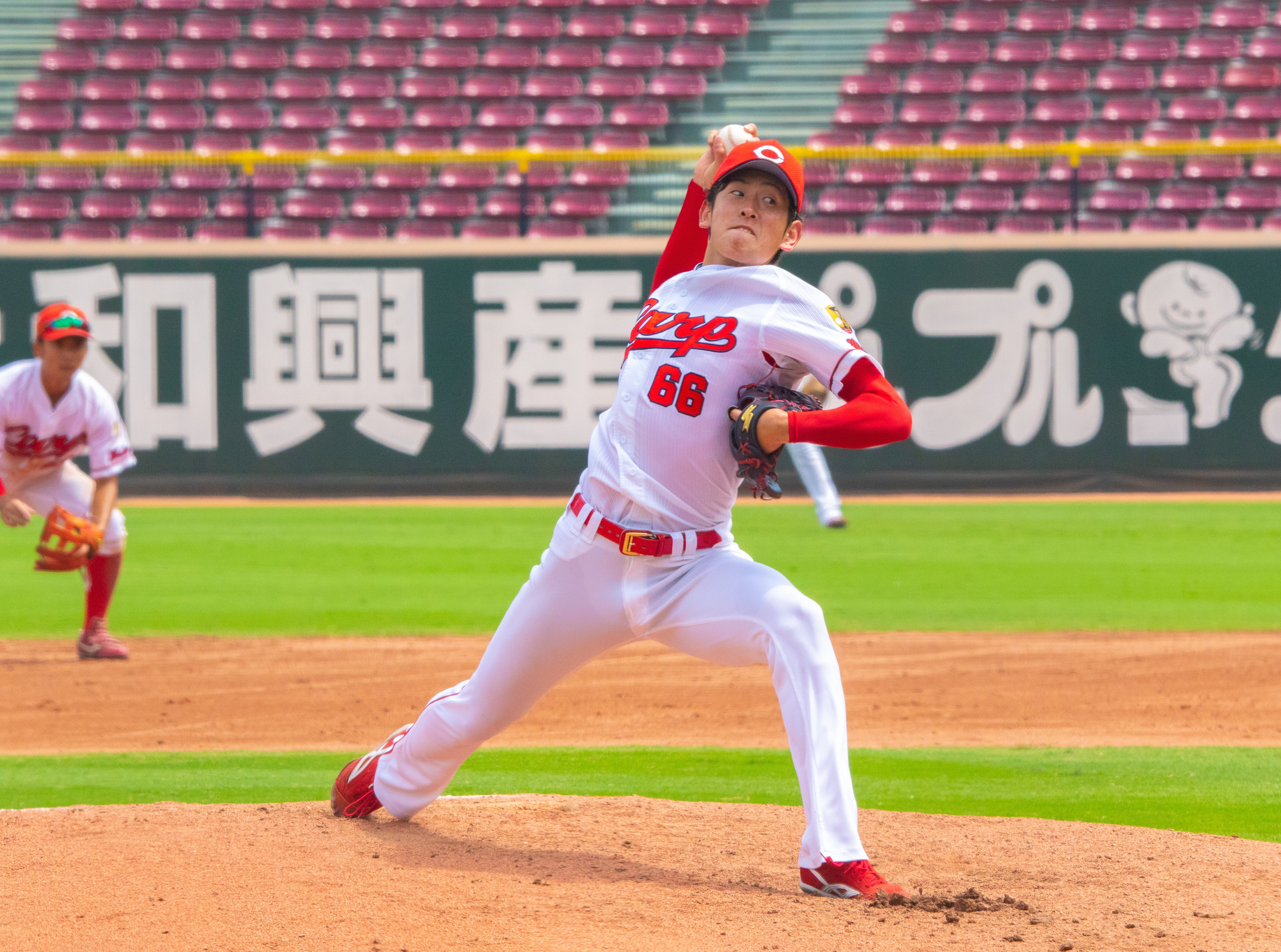 2018/8/28 マツダスタジアム